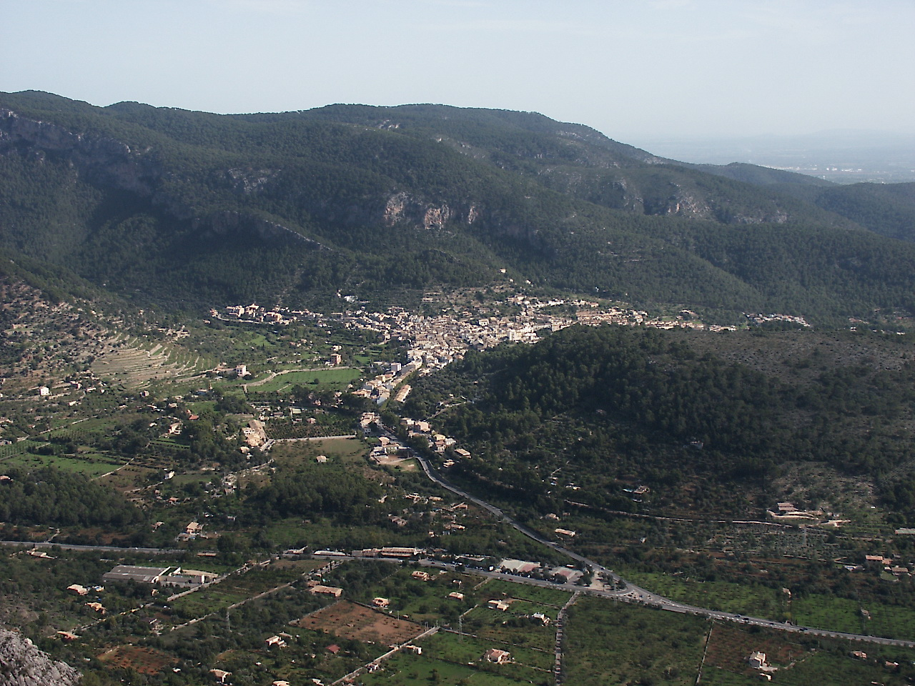 Bunyola des de Sa Gúbia. Mallorca.